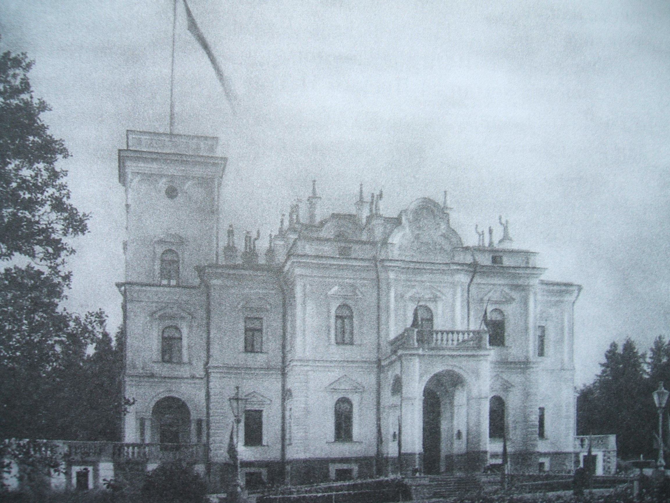 Фотография замка Стенбок-Фермеров в Лахте